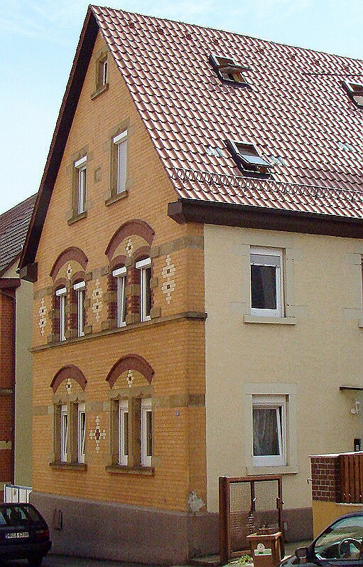 Ausschnitt aus Hn-boeck-eppinger51.jpg